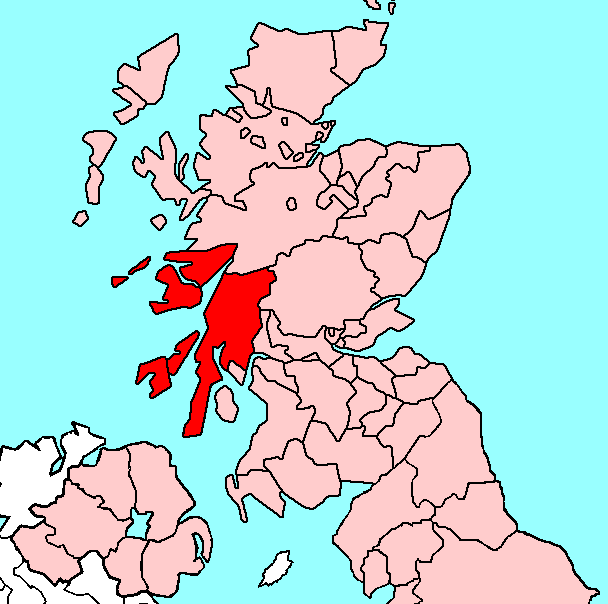 Argyll